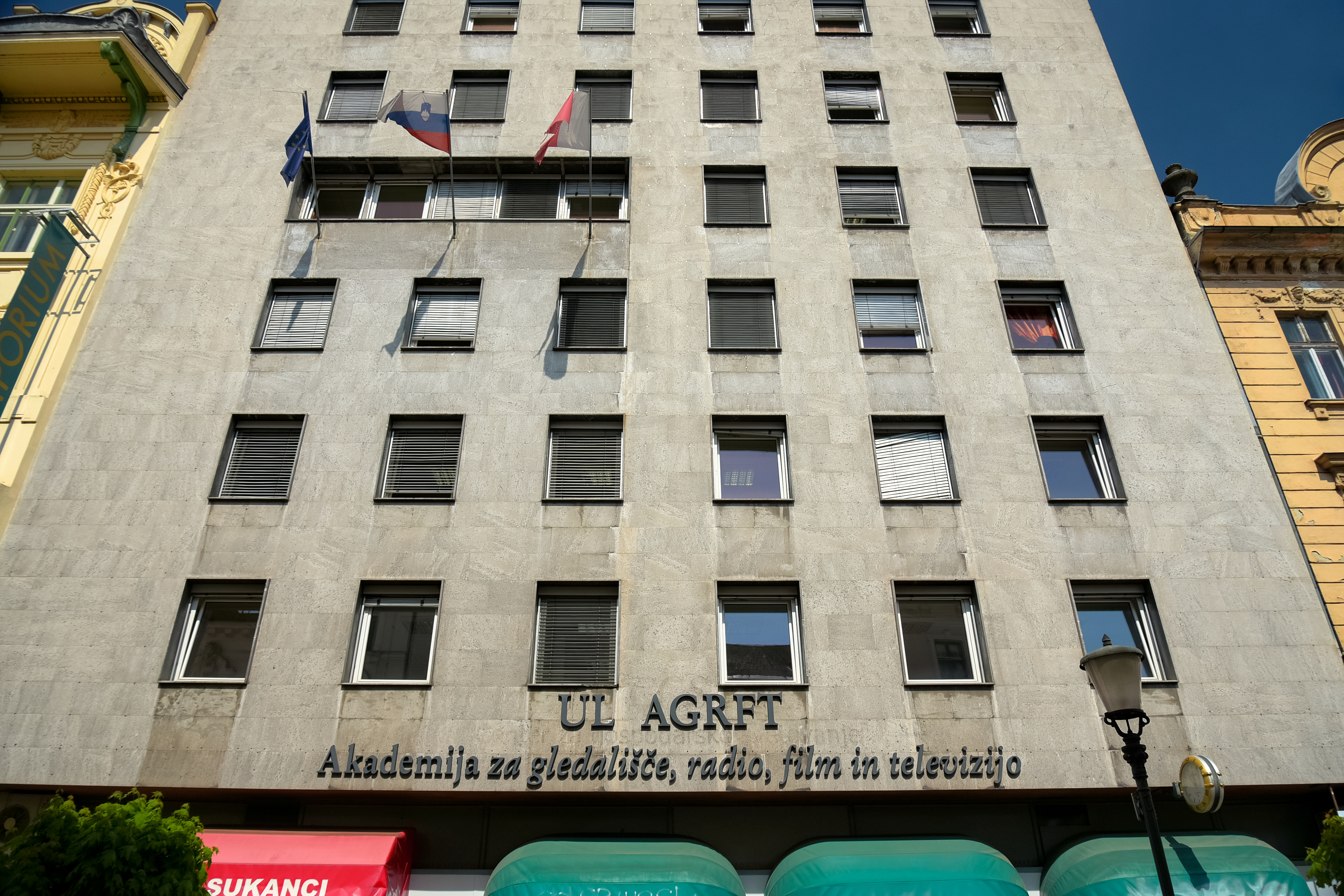 Ljubljana (Slovenia)